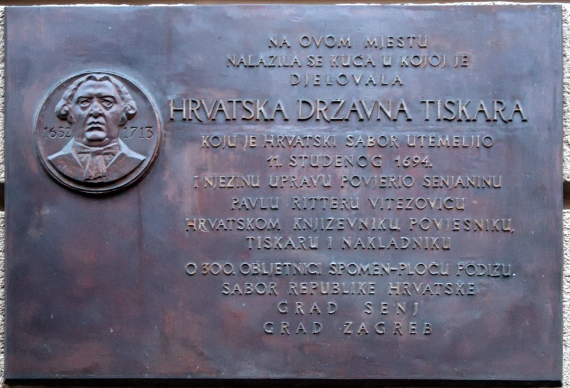 Spomen ploča Hrvatskoj državnoj tiskari u Zagrebu